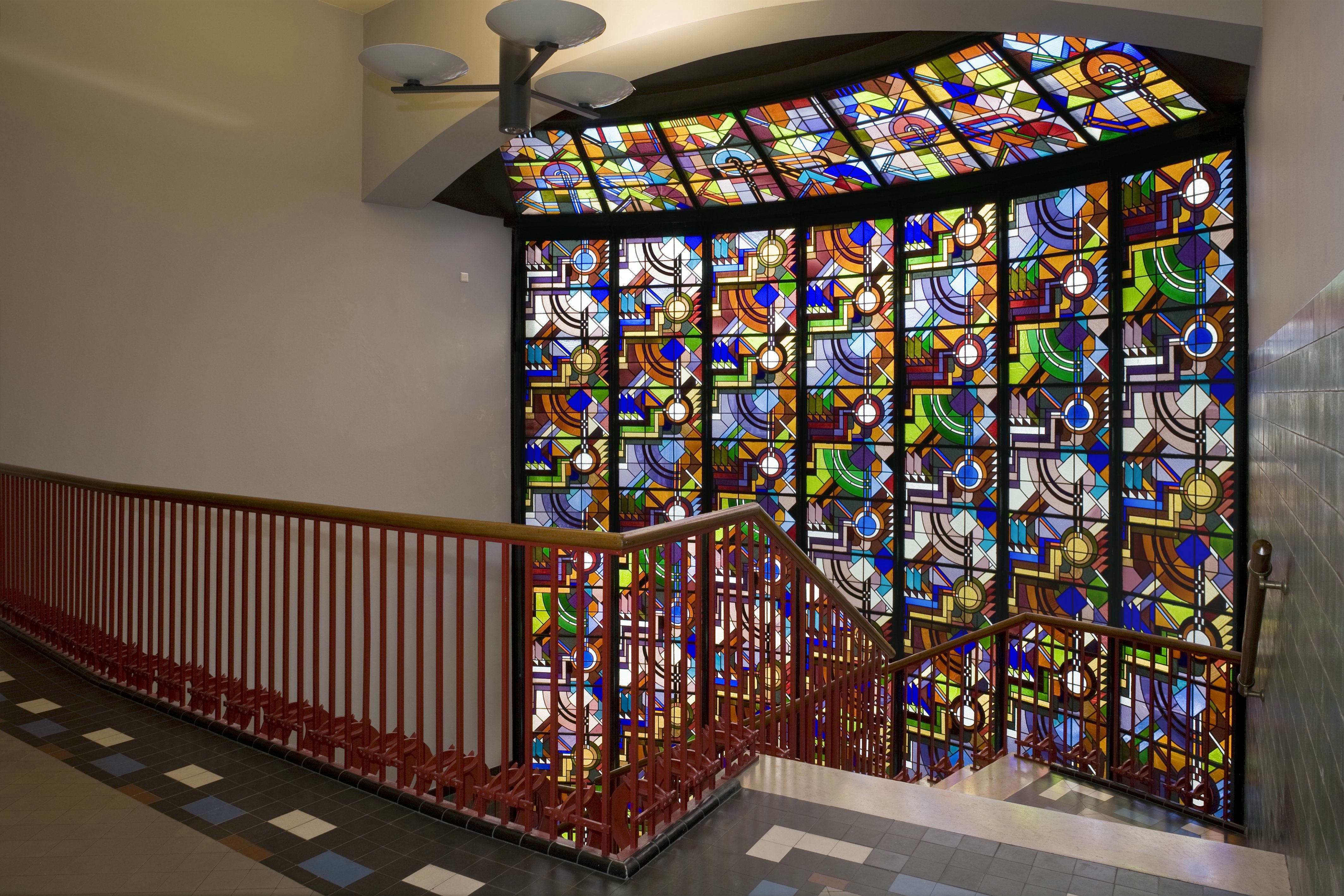 Gemeentewerken: Trappenhuis, tweede verdieping overzicht met glas-in-loodramen